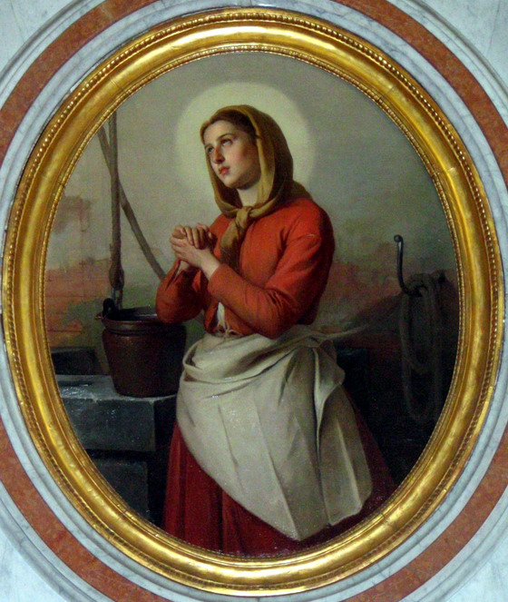 Asti, Chiesa di San Silvestro.Quadro di S.Zita (Michelangelo Pittatore)